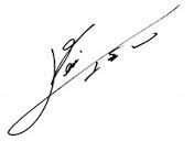 Firma de Messi